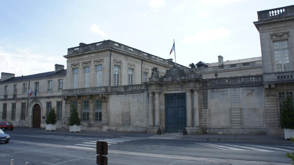 Vue de Châlons-en-Champagne montrant le Conseil Général et la Préfecture de la Marne rue Carnot.